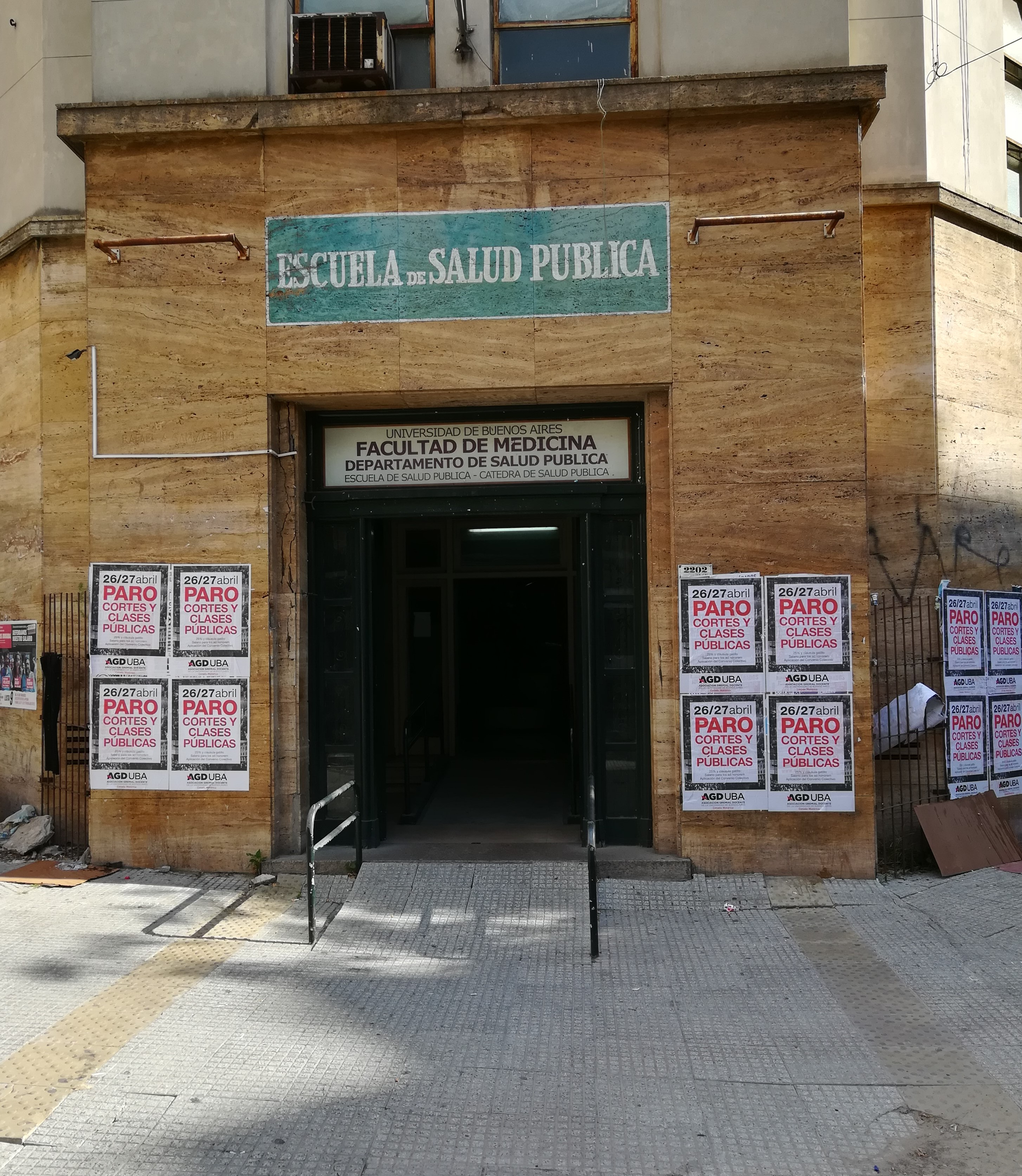 Escuela de Salud Pública de la Facultad de Medicina, en la esquina de las calles Marcelo T. de Alvear y Uriburu.